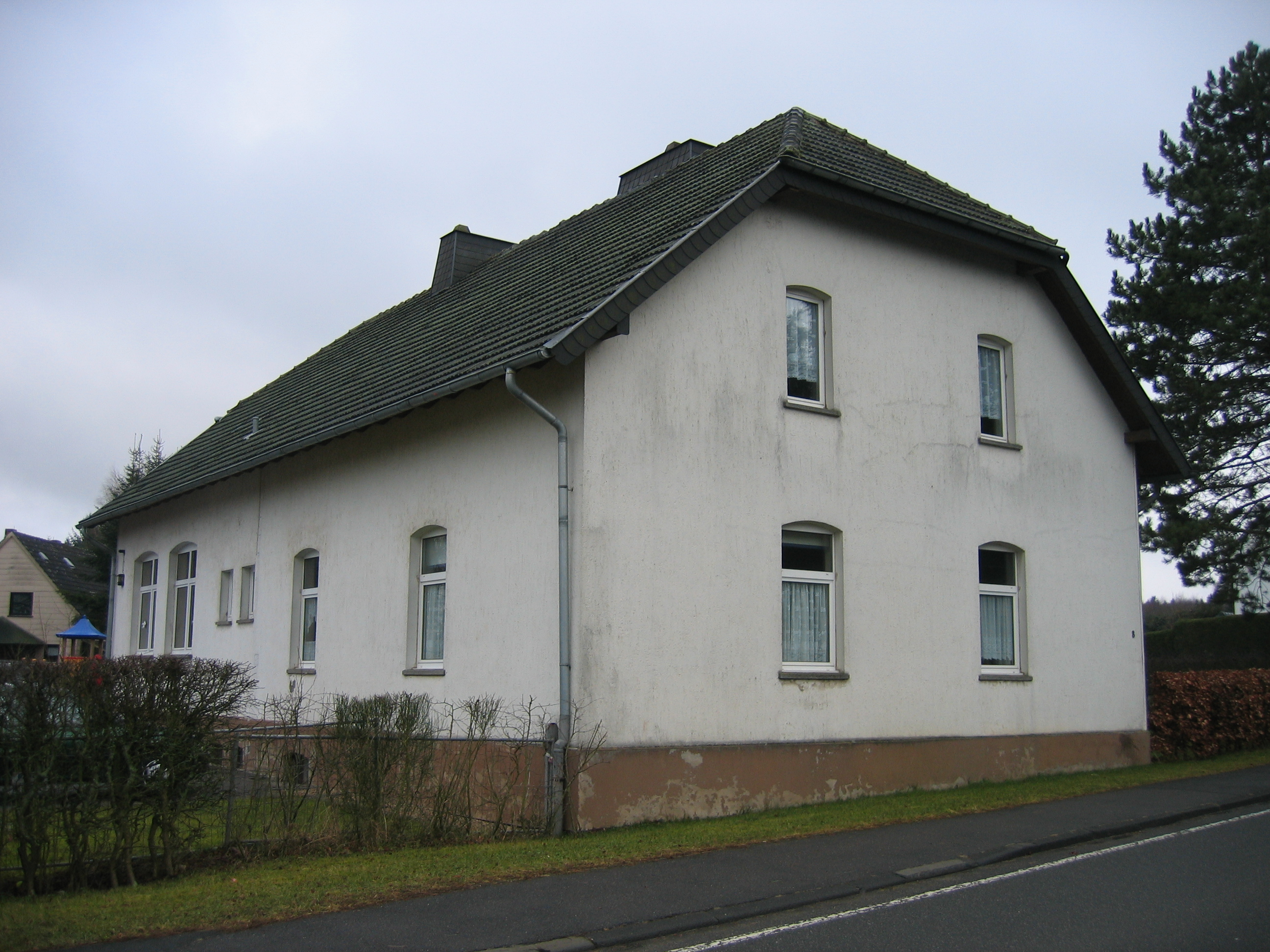 Dorfgemeindehaus Schleiden-Broich